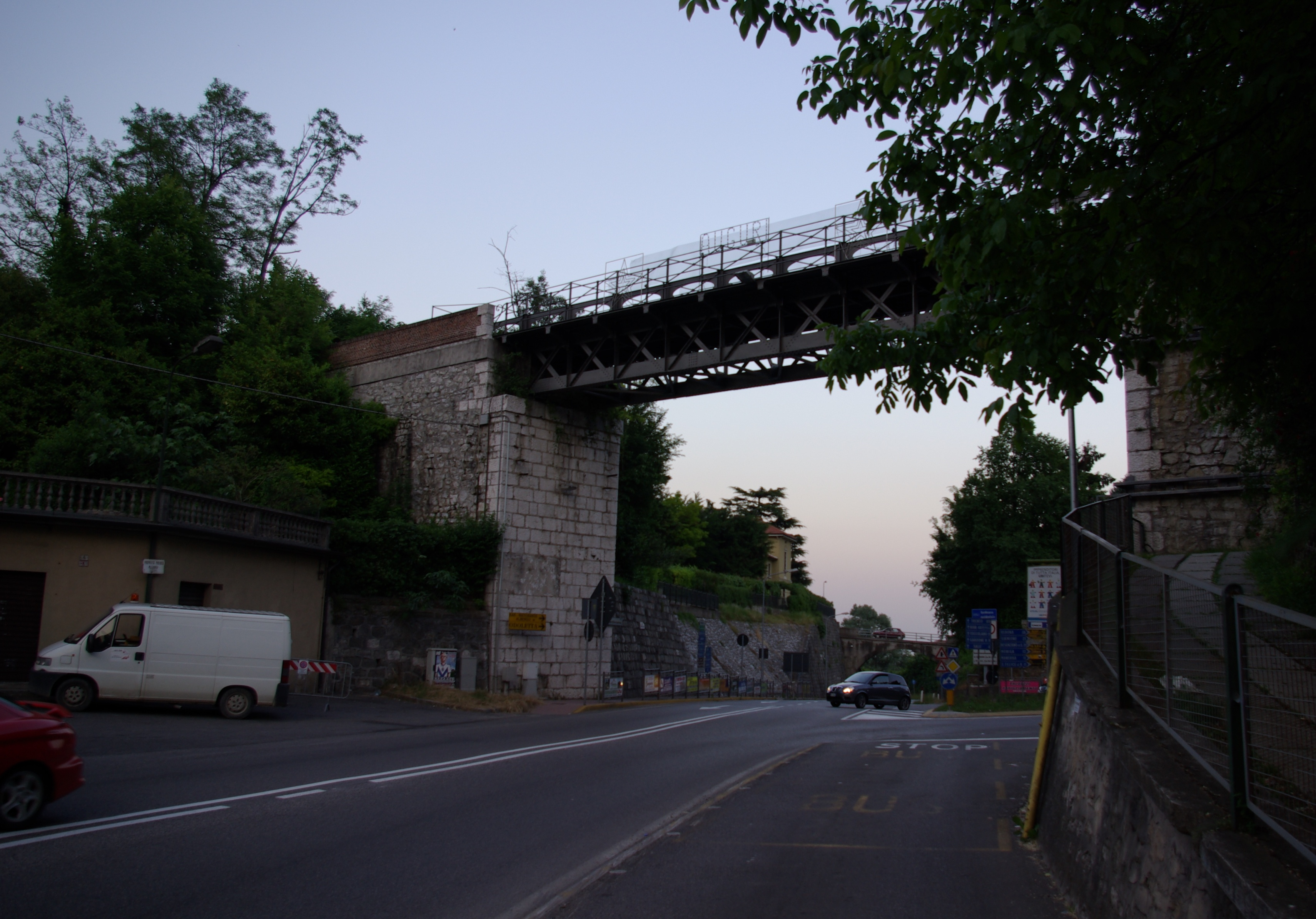 Ehemalige Eisenbahnbrücke in Ponte Pier (Roè Volciano), Provinz Brescia